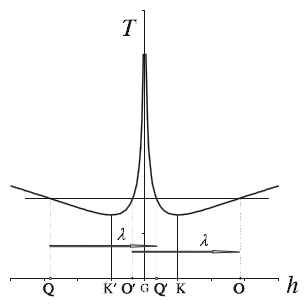 Péndulo compusto - Periodo